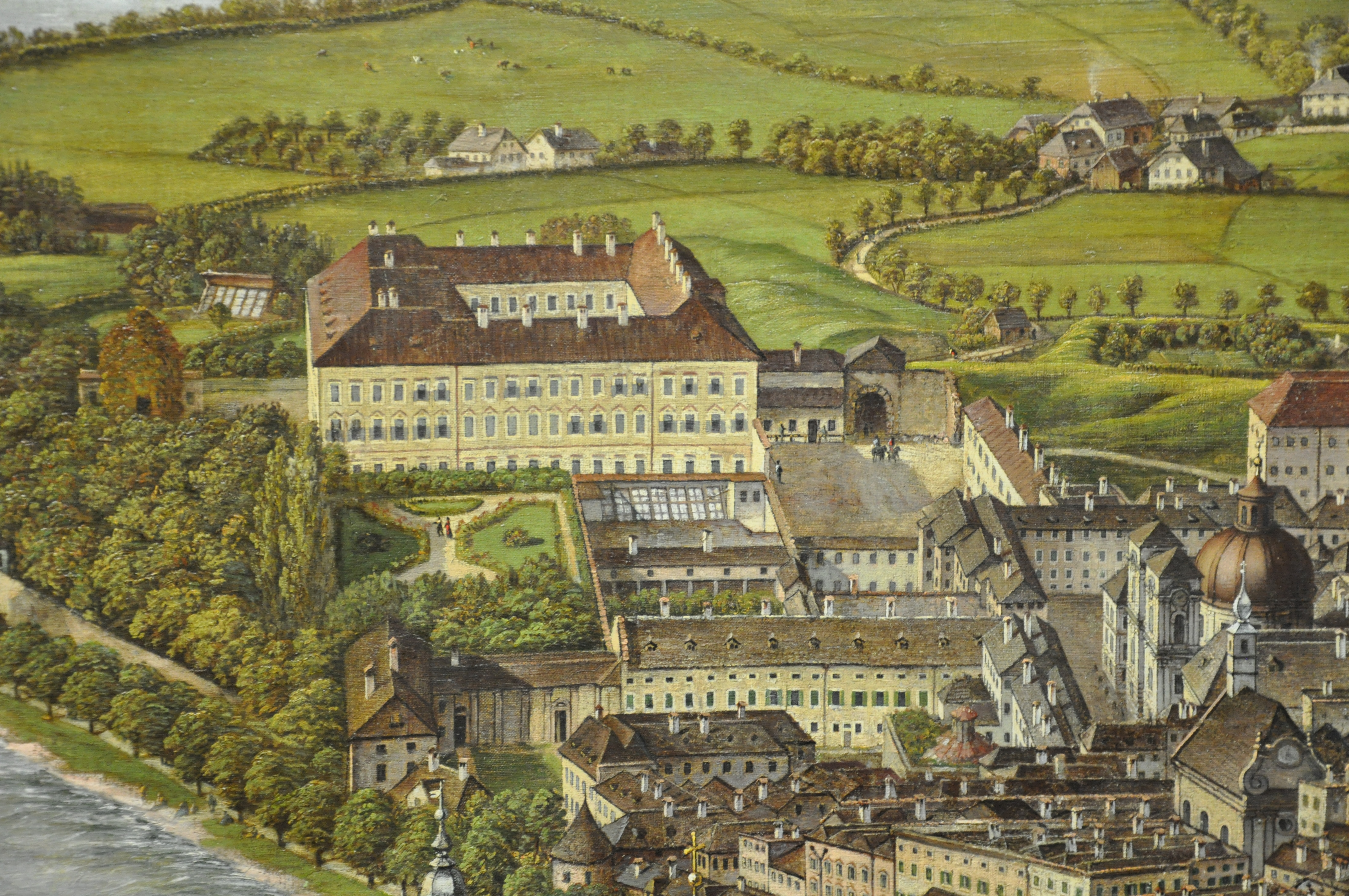 Panorama der Stadt Salzburg von Johann Michael Sattler, 1825–1829. Panoramamuseum des Salzburg Museums. Schloss Mirabell